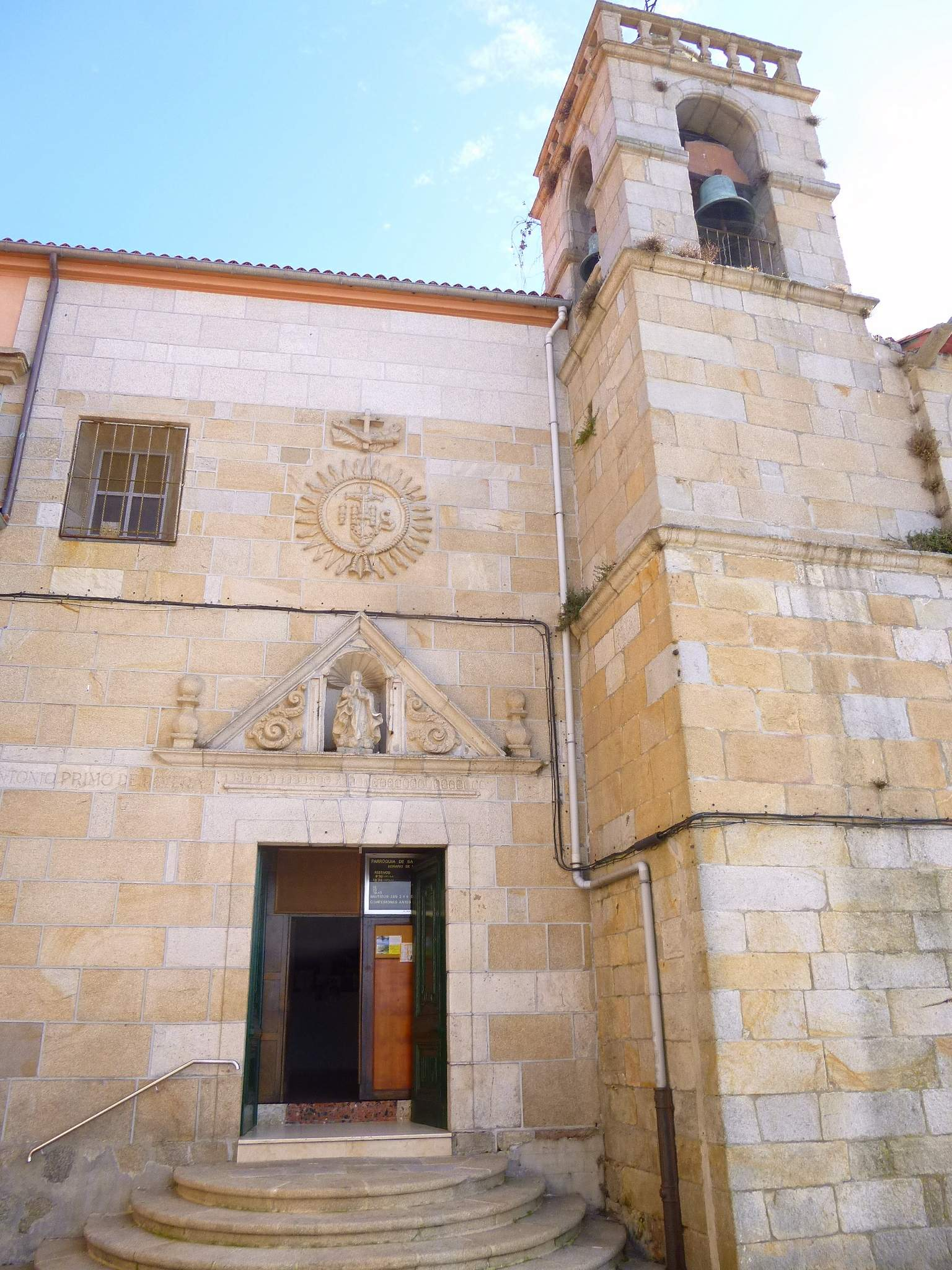 Vigo - Antiguo Convento de San Francisco